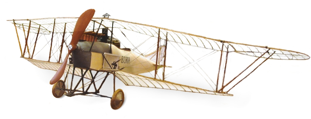 Modell des Lohner-Pfeilfliegers Type B. Modell 1:10.